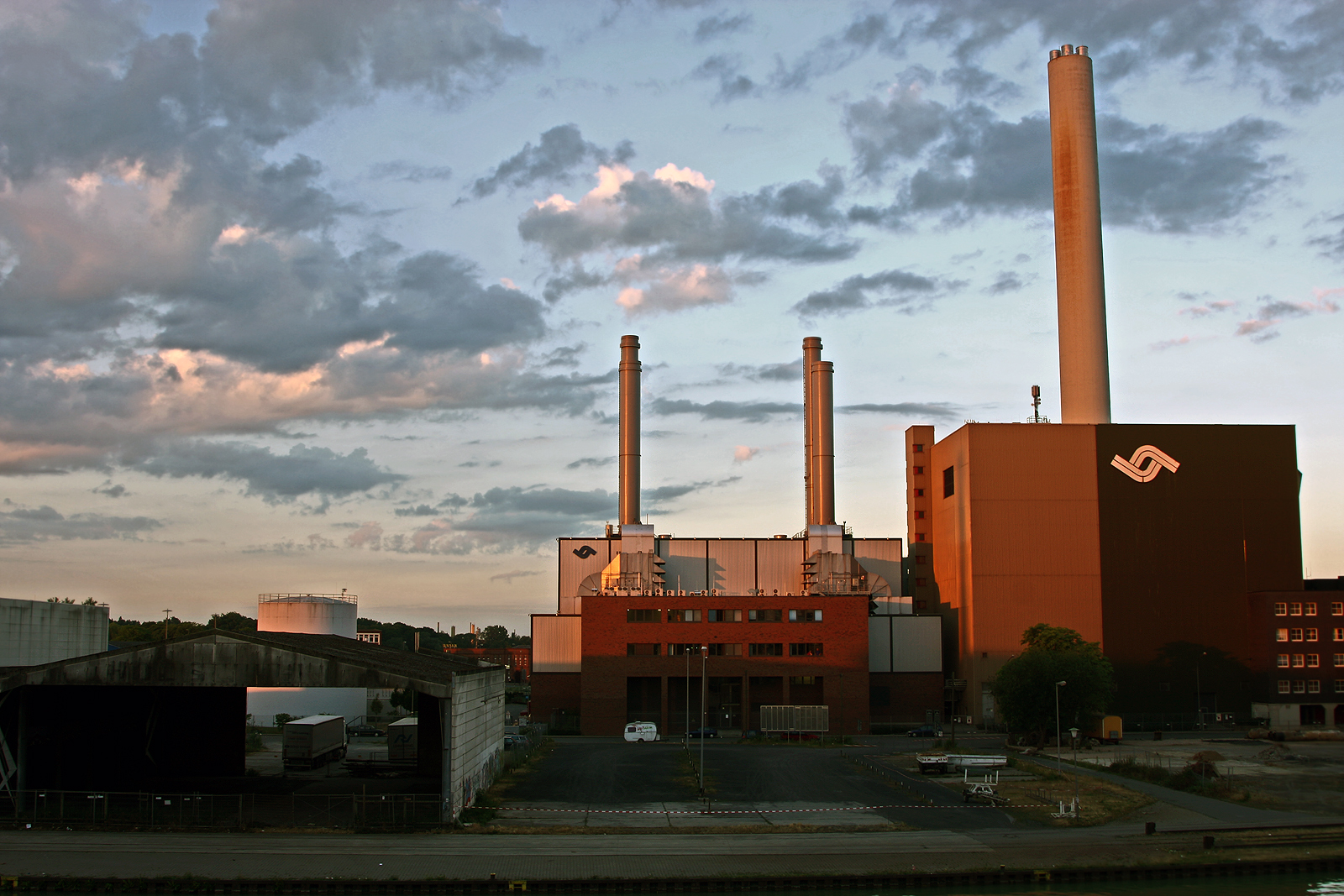 Hafenviertel in Münster/ Dzielnica portowa Münster